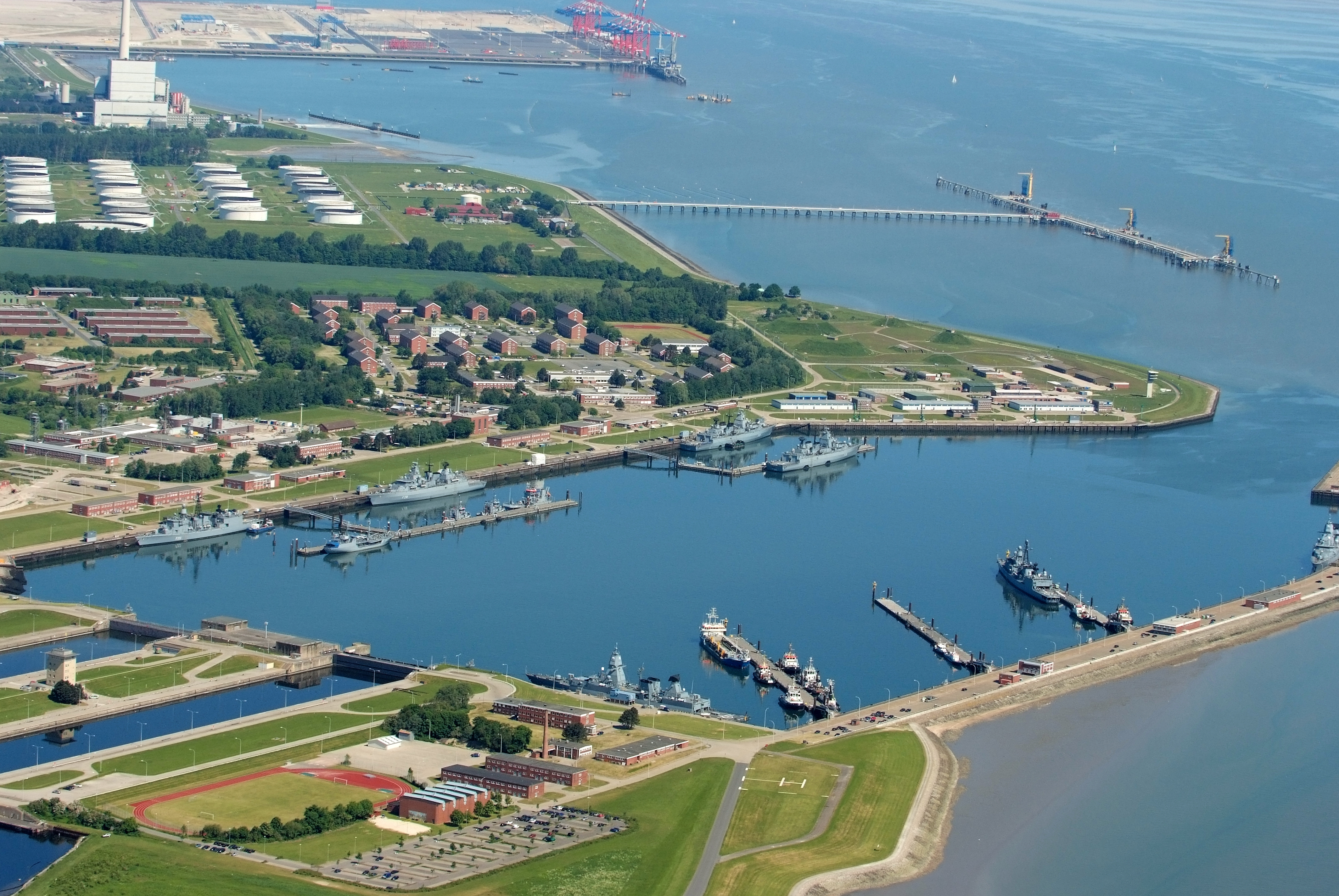 Heppenser Groden mit Seeschleuse Wilhelmshaven und Marinestützpunkt, NWO Pier, Nord-West-Oelleitung, JadeWeserPort, Eon-Kraftwerk (Fotoflug vom Flugplatz Nordholz-Spieka über Cuxhaven und Wilhelmshaven)